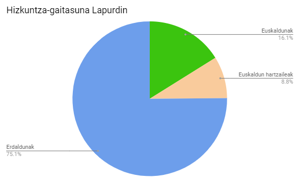 Lapurdiko hizkuntza-gaitasuna, 2016ko ikerketa soziolinguistikoaren arabera. Grafikoan BAB edo BAM eskualdeko datuak Lapurdiko gainerako herrien datuekin batu dira, beraz, probintzia guztiko biztanleriaren datuak grafiko bakarrean jarri direla esan daiteke.